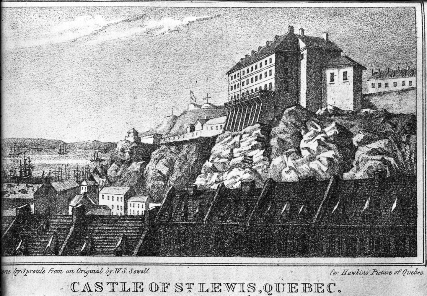 Gravure Castle of St. Lewis, Quebec, représentant le château Saint-Louis, à Québec. Gravure "on Stone by Sproule from an Original by W.S. Sewell for Hawkin's Picture of Québec". Publiée en 1834 dans le livre Hawkins's Picture of Québec, entre les pages 128 et 129.